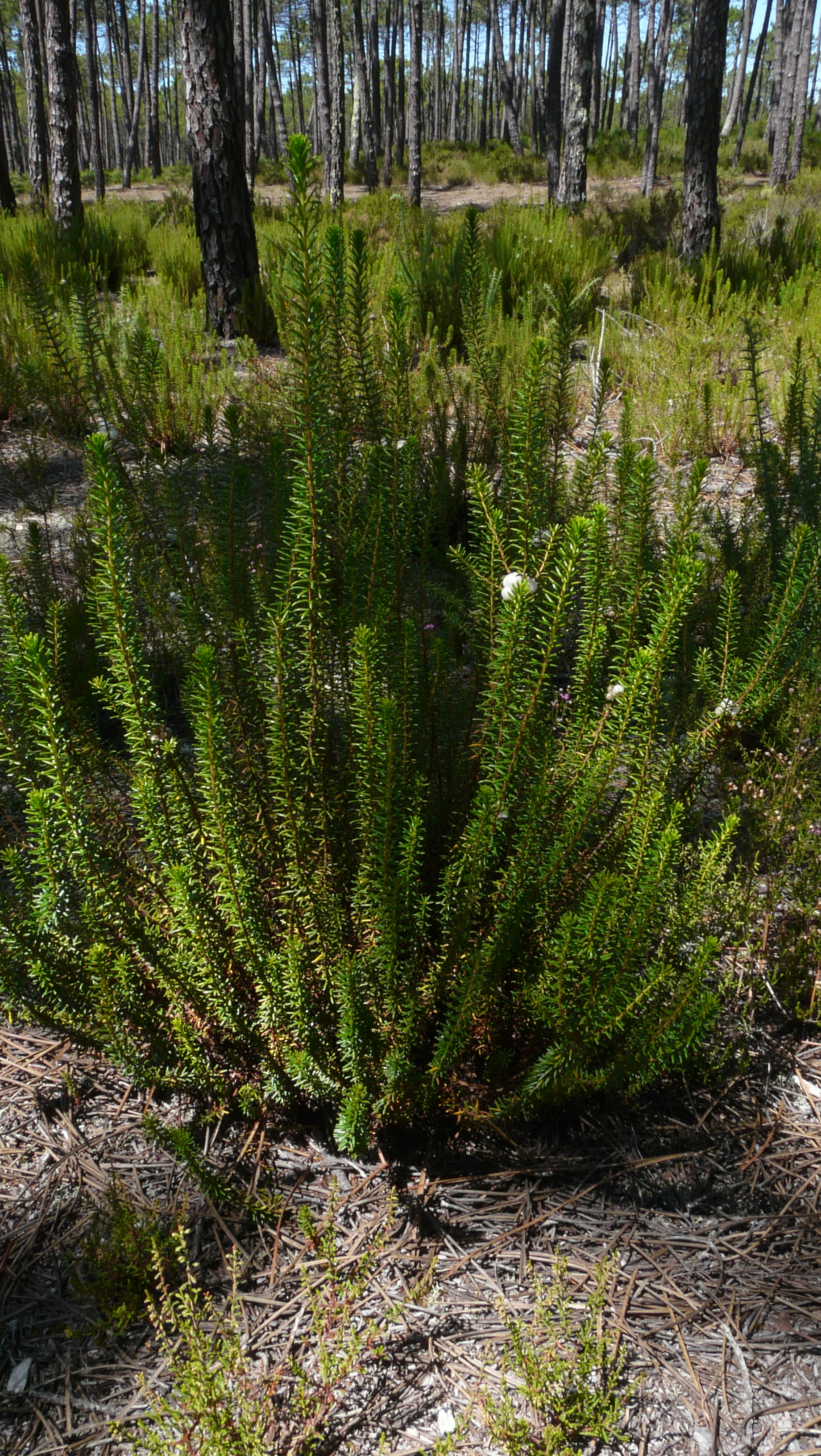 Camarinha, cerca de Ovar, Portugal. Julho 2009.